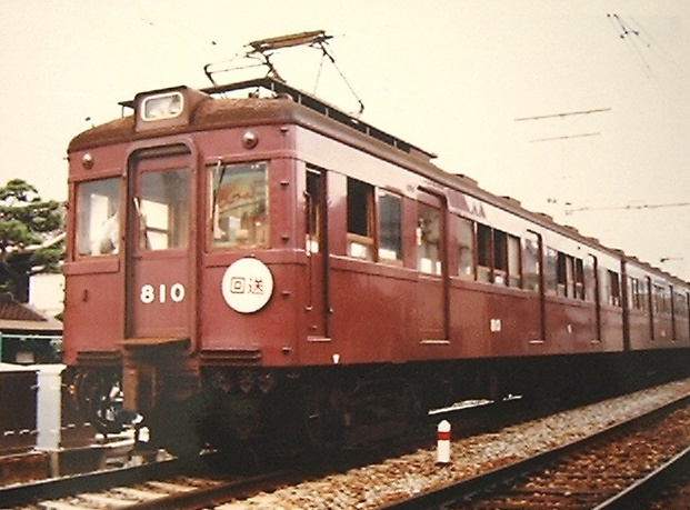 阪急８１０系１次車